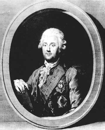 Portrait of Otto Magnus von Stackelberg (1736-1800)